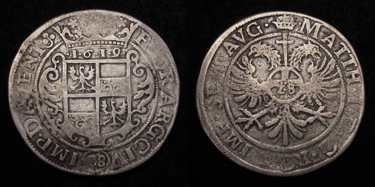 28 stuivers of zilveren florijn uit 1666 van Deventer